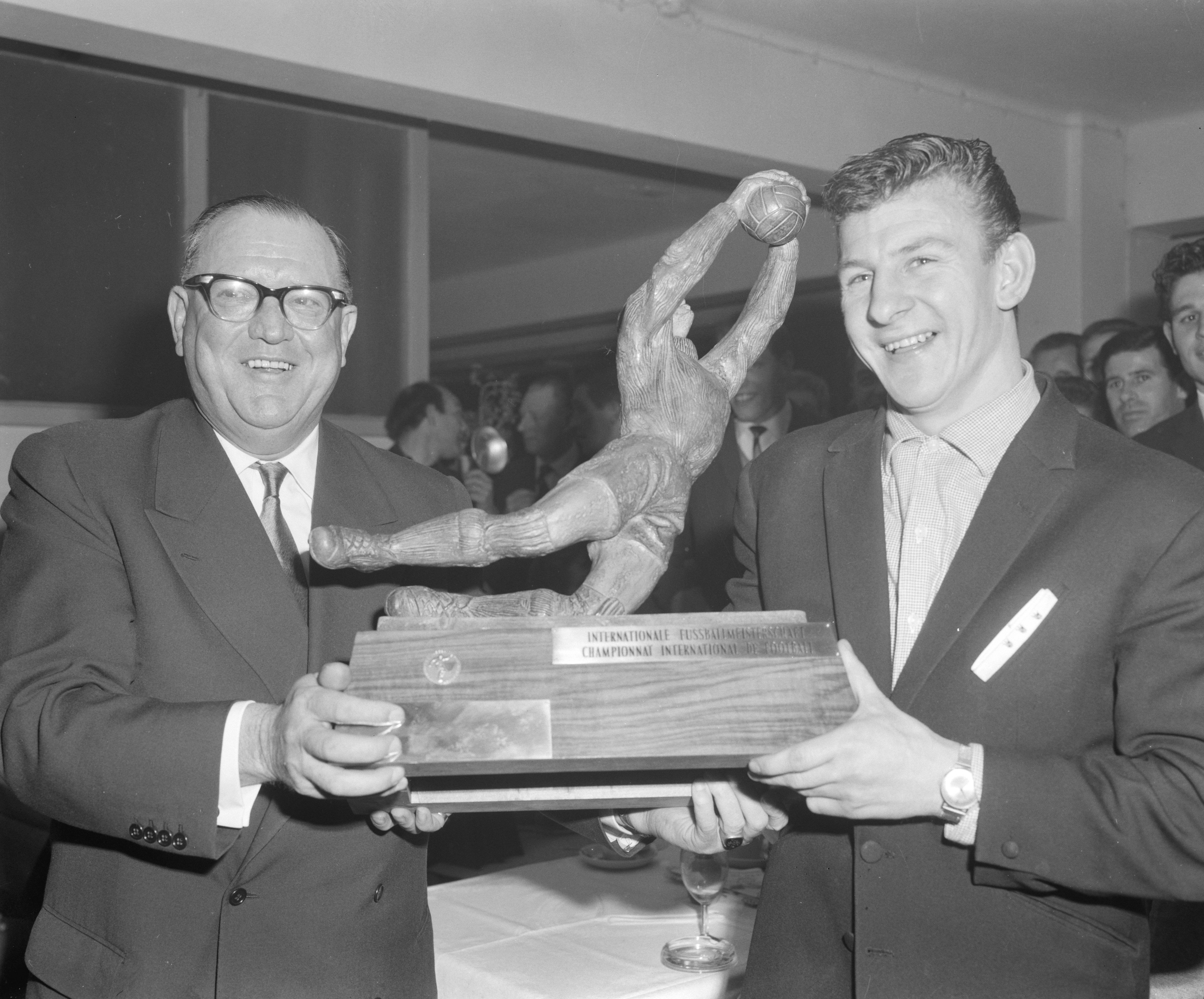 Collectie / Archief : Fotocollectie Anefo Reportage / Serie : [ onbekend ] Beschrijving : Ajax tegen Feyenoord 4-2 Wiedekehr en Co Prins met trof Datum : 26 april 1962 Trefwoorden : sport, trofeeen, voetbal Persoonsnaam : Co prins Instellingsnaam : Feyenoord Fotograaf : Bilsen, Joop van / Anefo Auteursrechthebbende : Nationaal Archief Materiaalsoort : Negatief (zwart/wit) Nummer archiefinventaris : bekijk toegang 2.24.01.04 Bestanddeelnummer : 913-8132 Reacties Geplaatst door Maaike op 03 december 2012 - 17:02. Intertoto-trofee uitgereikt door de heer Wiederkehr van de Europese Voetbal Unie aan Co Prins, aanvoerder van Ajax. De trofee is een beeldje van een duikende keeper. Persoonsnamen: Gustav Wiederkehr; Co Prins Locatie: Olympisch Stadion Plaats: Amsterdam Instellingsnamen: Ajax; Europese Voetbal Unie (UEFA); Intertoto